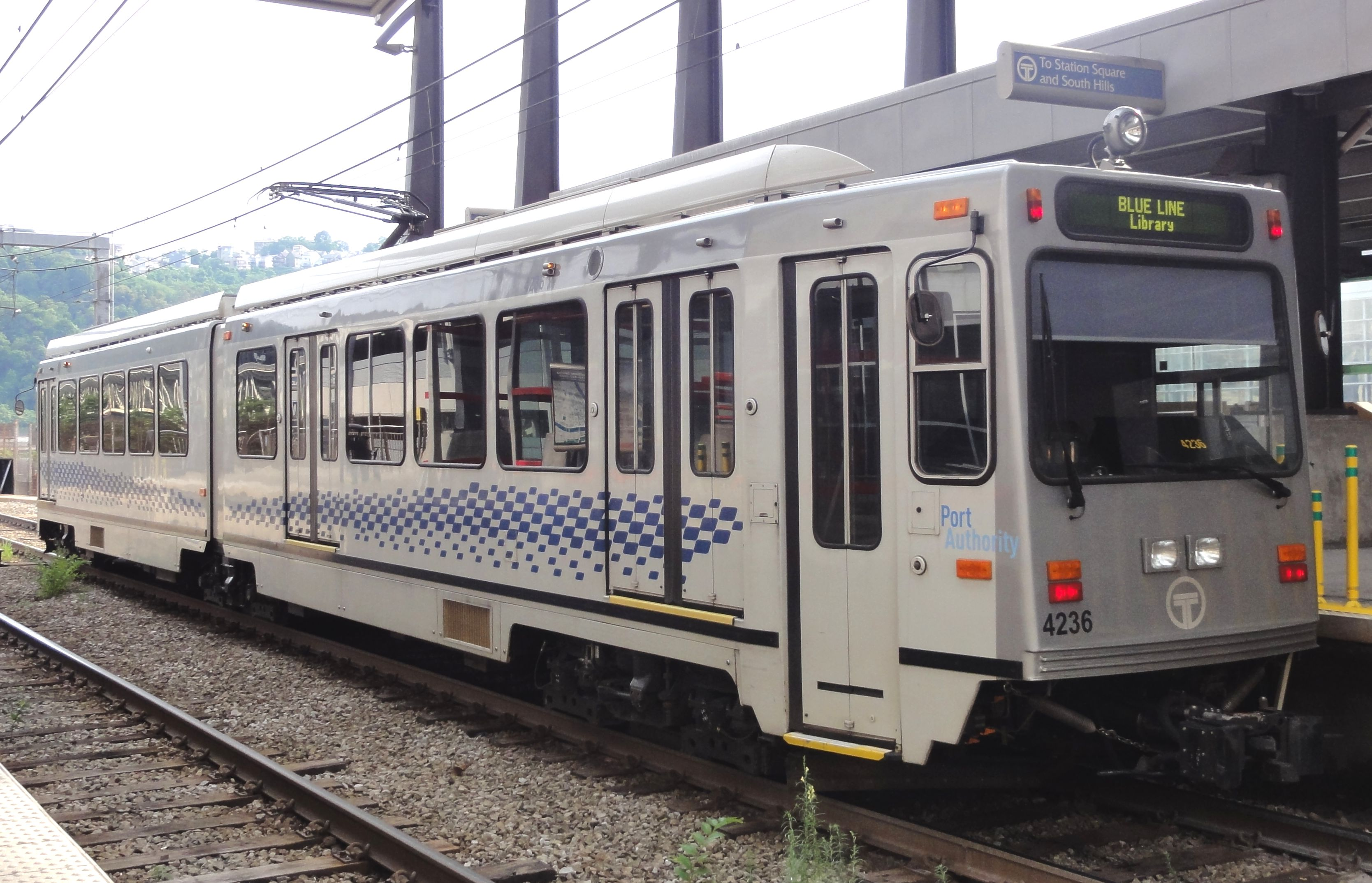 Siemens SD-400 4236